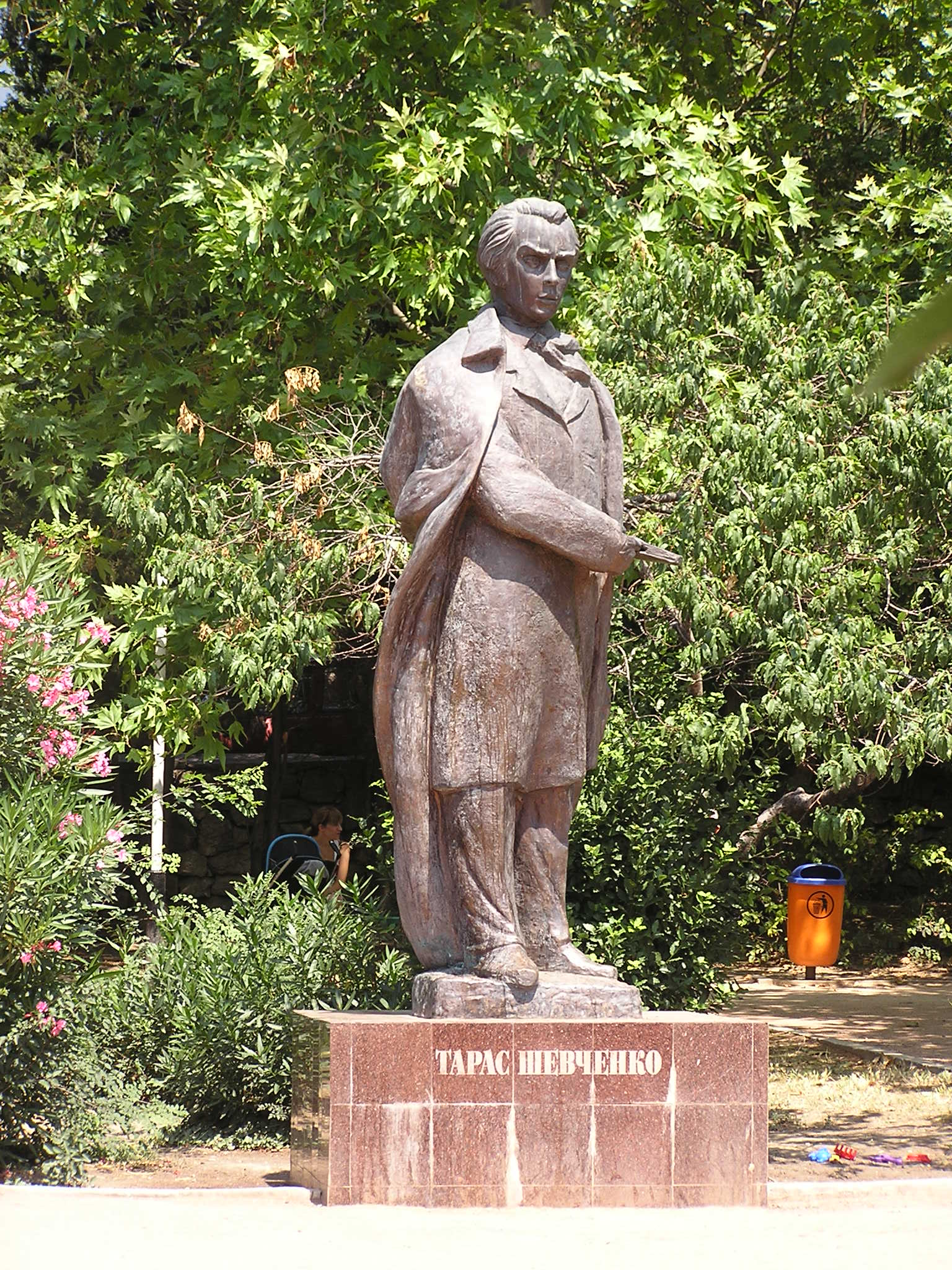 Ялта